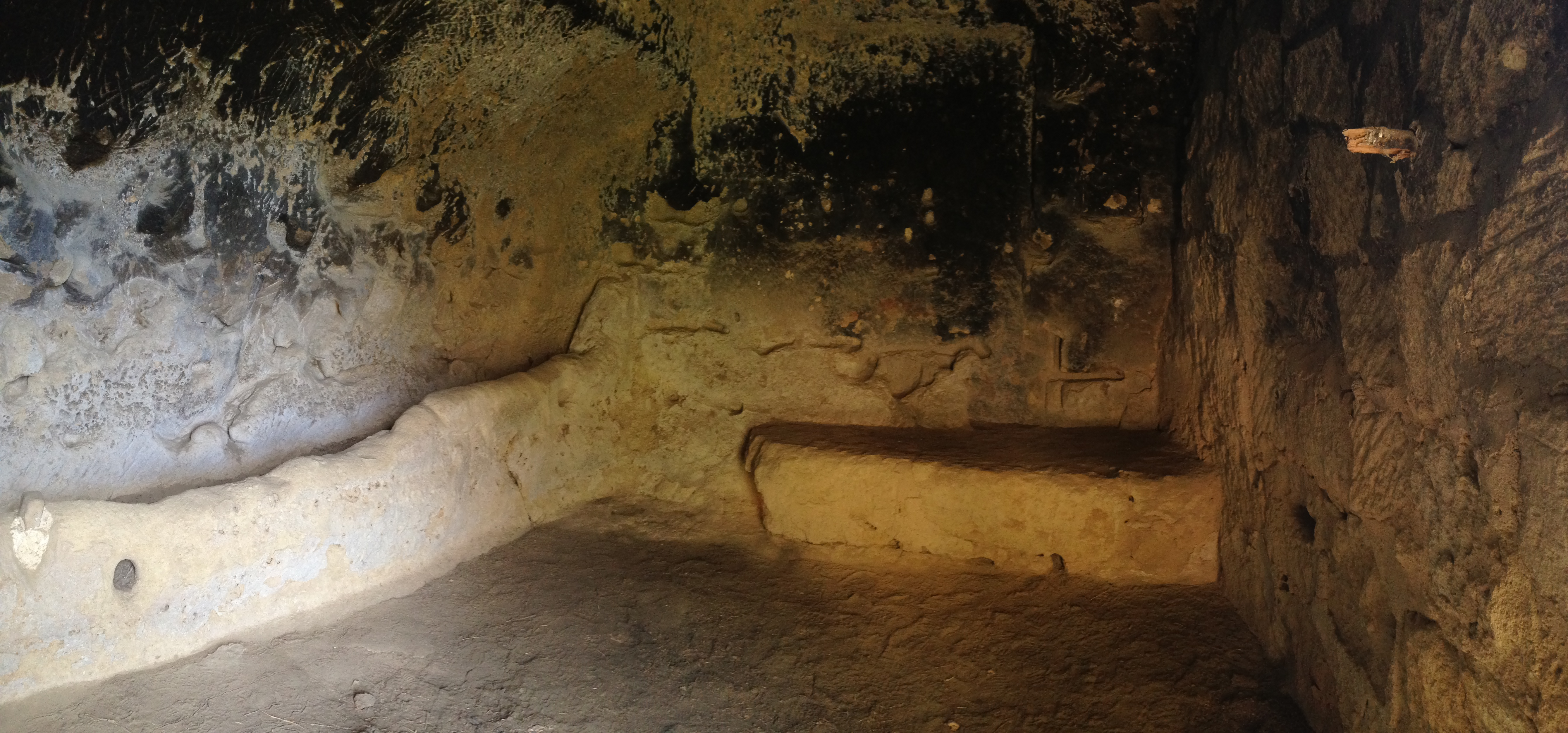 tomba Realmese